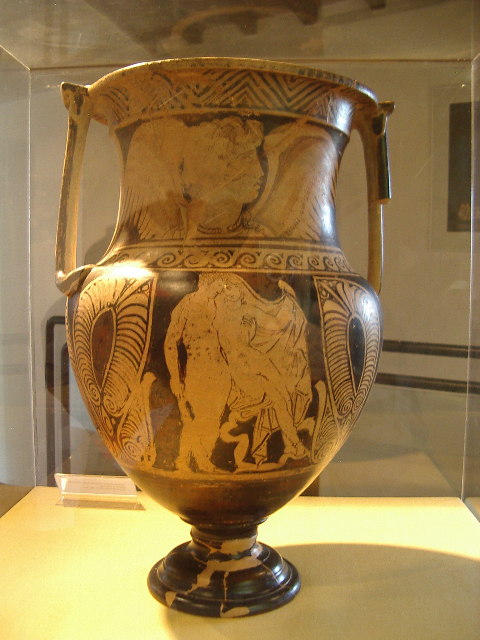 Antiquarrium de la nécropole du Palazzone: Amphore étrusque, Vase de Thislovely du maître d'Hésione, scène:Hercules enlace Hésione, qui montre sa reconnaissance pour son sauvetage